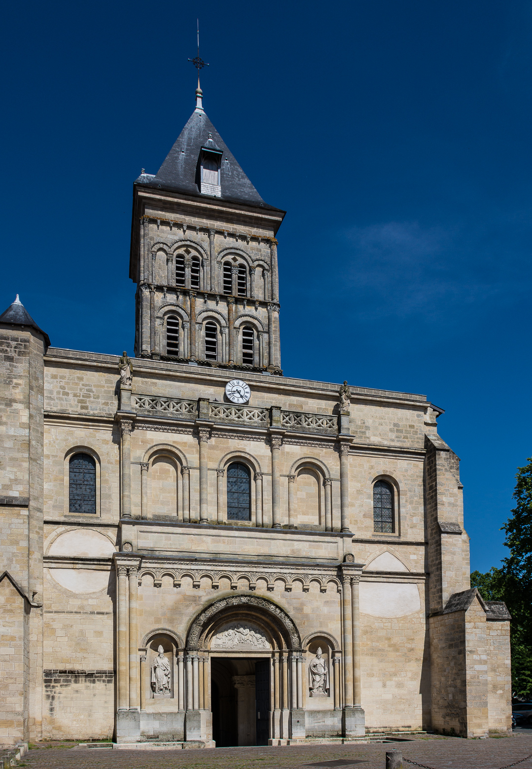 Basilique Saint-Seurin de Bordeaux, façade